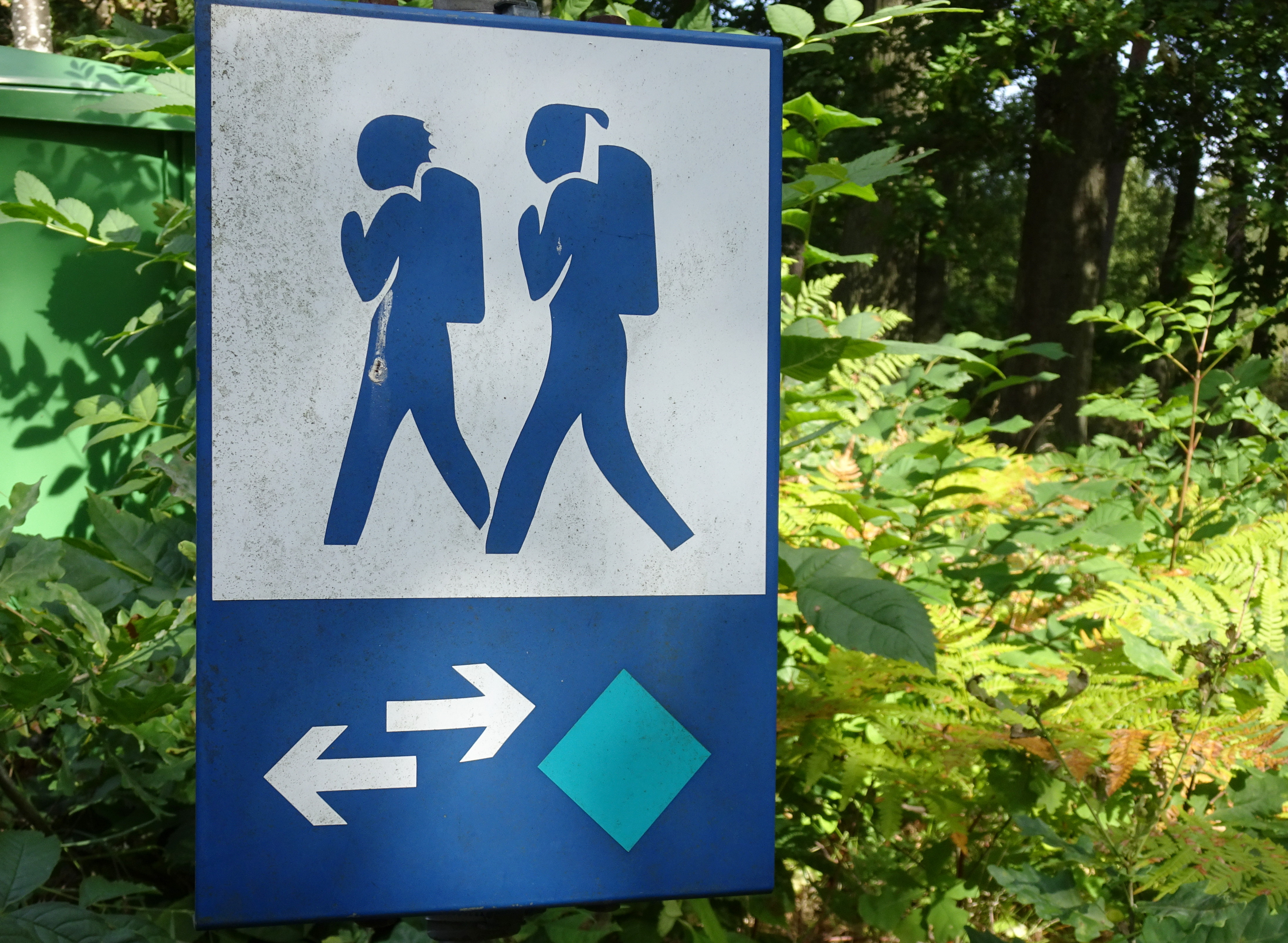 Vägmarkeringar för Ekerö-Munsöleden